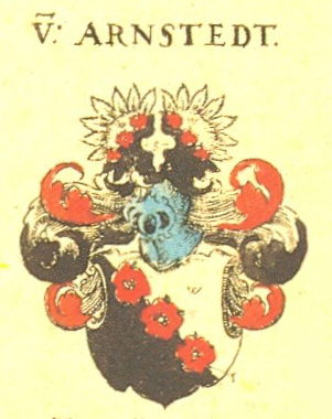 Wappen des märkischen Adelsgeschlechts Arnstedt